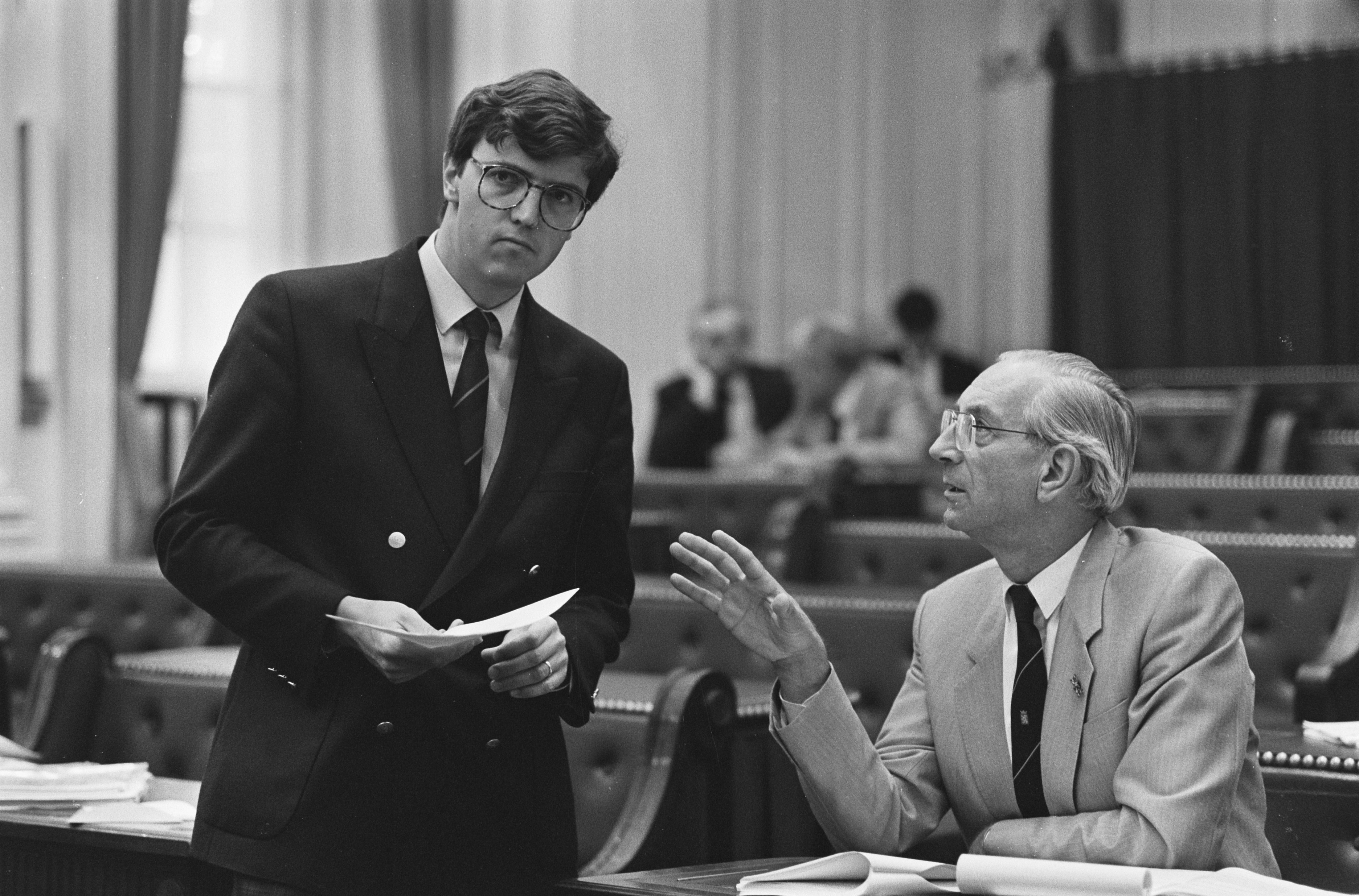 Collectie / Archief : Fotocollectie Anefo Reportage / Serie : [ onbekend ] Beschrijving : Tweede Kamer : mediadebat; l: mediawoordvoerder Hermans (VVD), r: CDA college van der Sanden Datum : 3 september 1986 Instellingsnaam : Tweede Kamer, VVD Fotograaf : Fotograaf Onbekend / Anefo Auteursrechthebbende : Nationaal Archief Materiaalsoort : Negatief (zwart/wit) Nummer archiefinventaris : bekijk toegang 2.24.01.05 Bestanddeelnummer : 933-7473